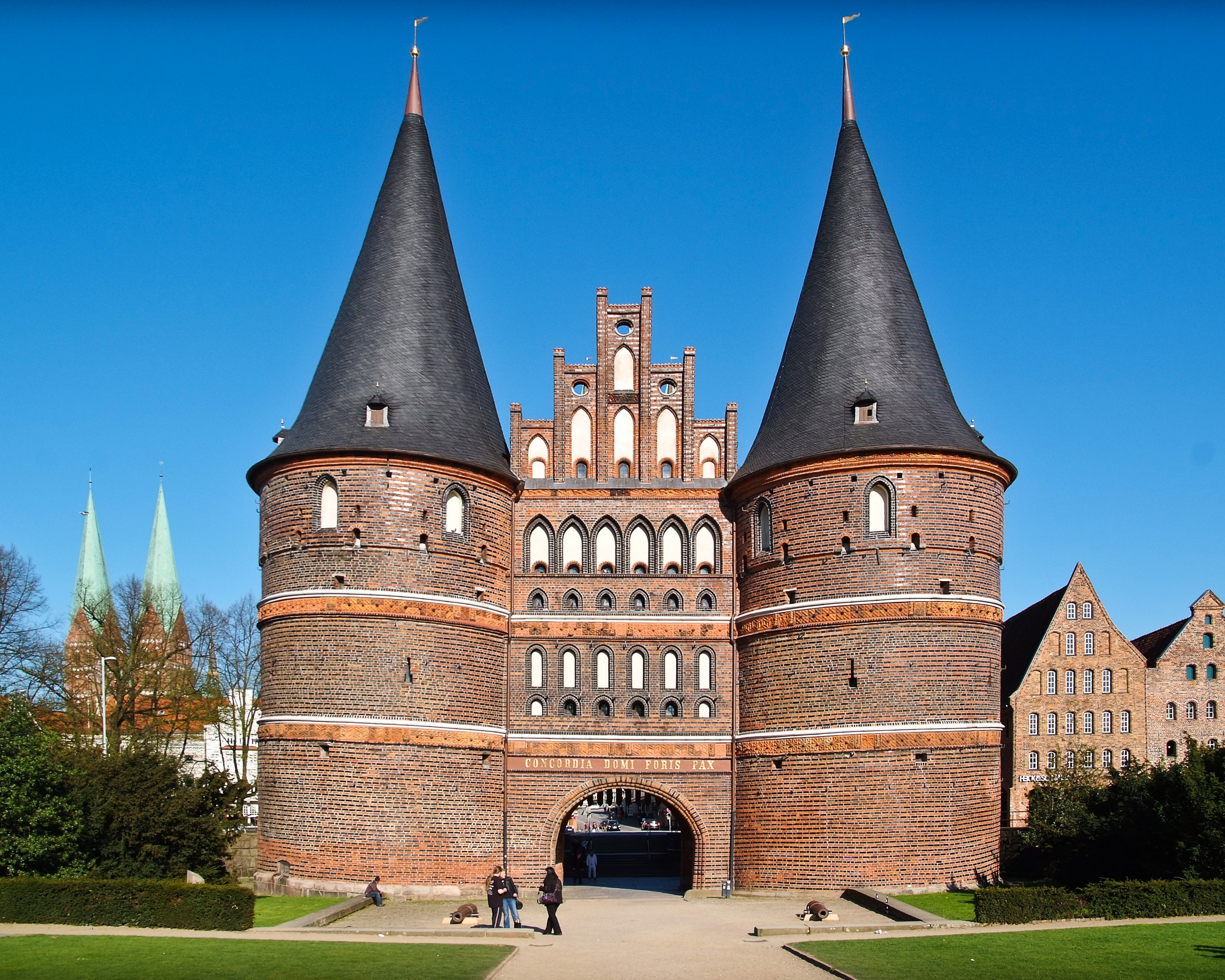 Holstentor in Lübeck